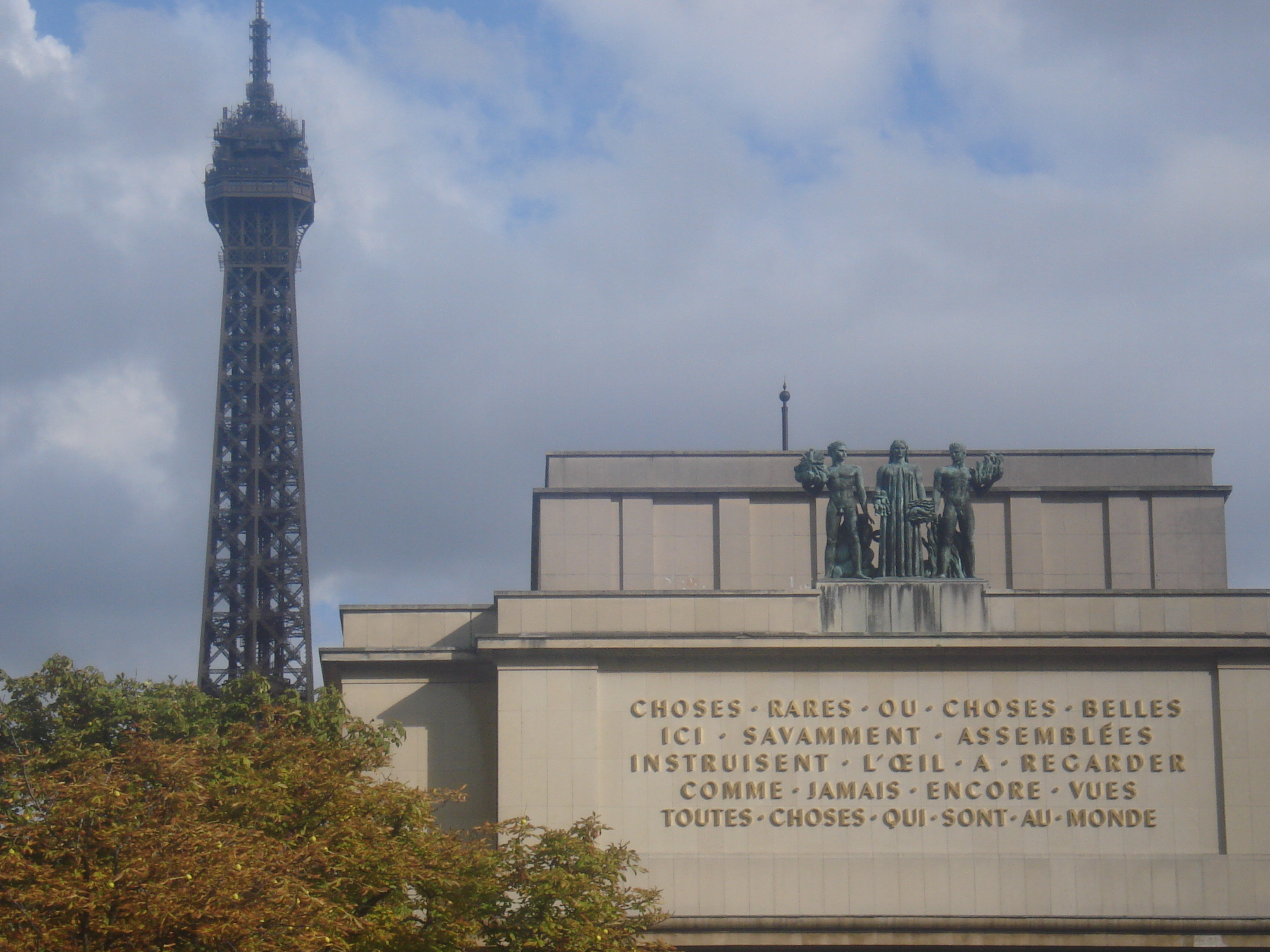 Palais de Chaillot (Classé) .